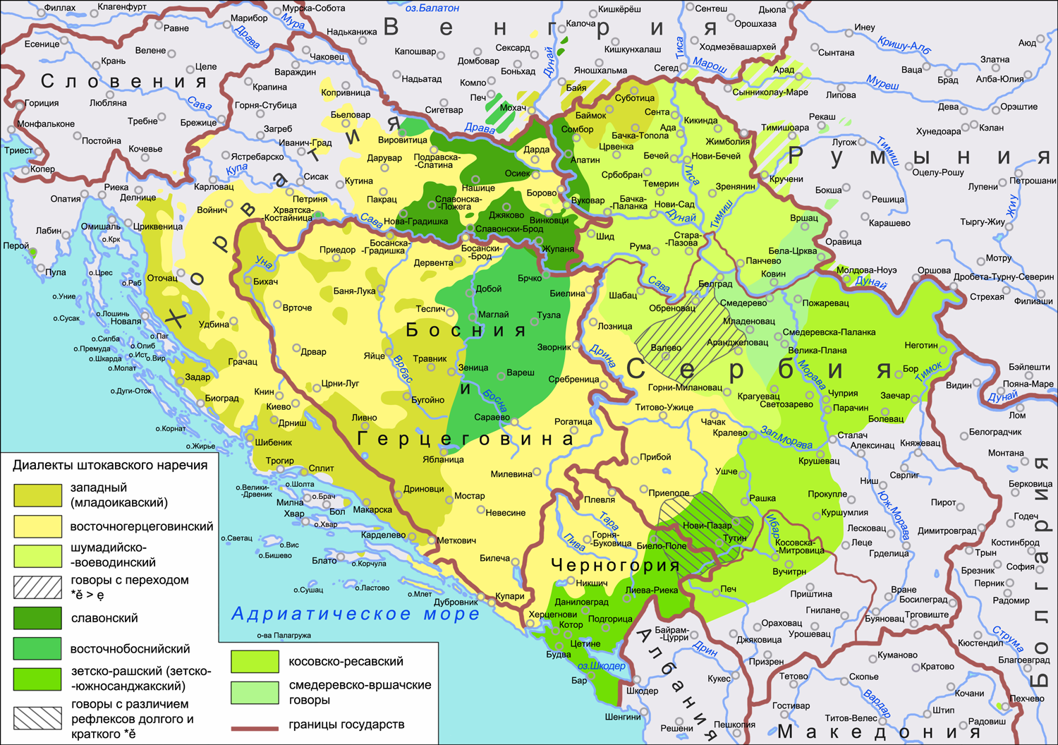 Карта распространения говоров штокавского наречия. Источники: Lisac J. Hrvatski dijalekti i govori štokavskog narječja i hrvatski govori torlačkog narječja // Hrvatska dijalektologija 1. — Zagreb: Golden marketing — Tehnička knjiga, 2003. — P. 160—161 (Karta 4. Dijalektološka karta štokavskog narječja). — ISBN 953-212-168-4 Browne W. Serbo-croat // The Slavonic Languages / Comrie B., Corbett G. — London, New York: Routledge, 1993. — P. 383 (Map 7.1. Serbo-Croat dialects). — ISBN 0-415-04755-2